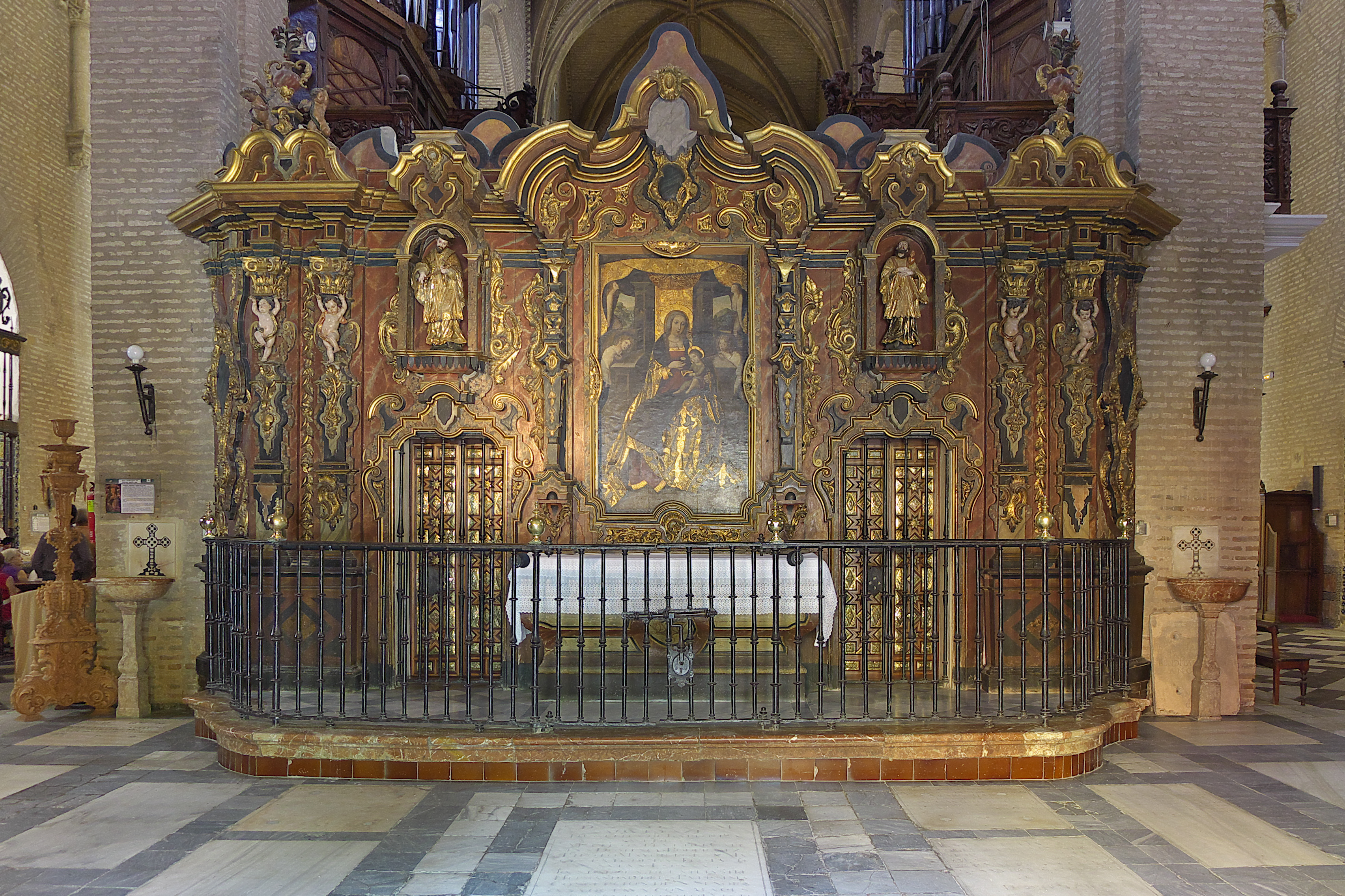 Martín de Toledo. Finales del siglo XVIII.